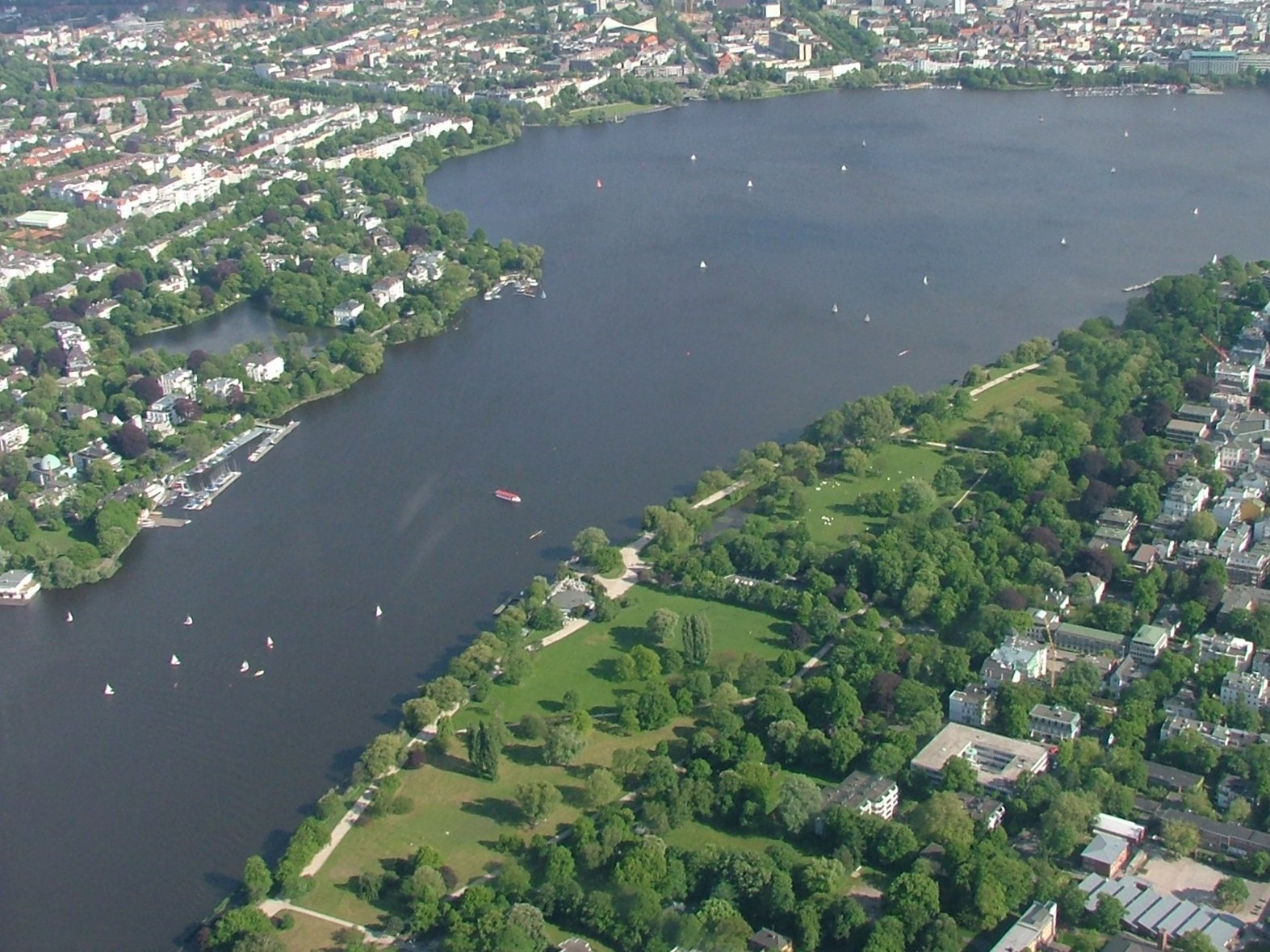 Blick über die Außenalster von der Eimsbütteler Seite aus gesehen. Am gegenüberliegenden Ufer liegt die Uhlenhorst.